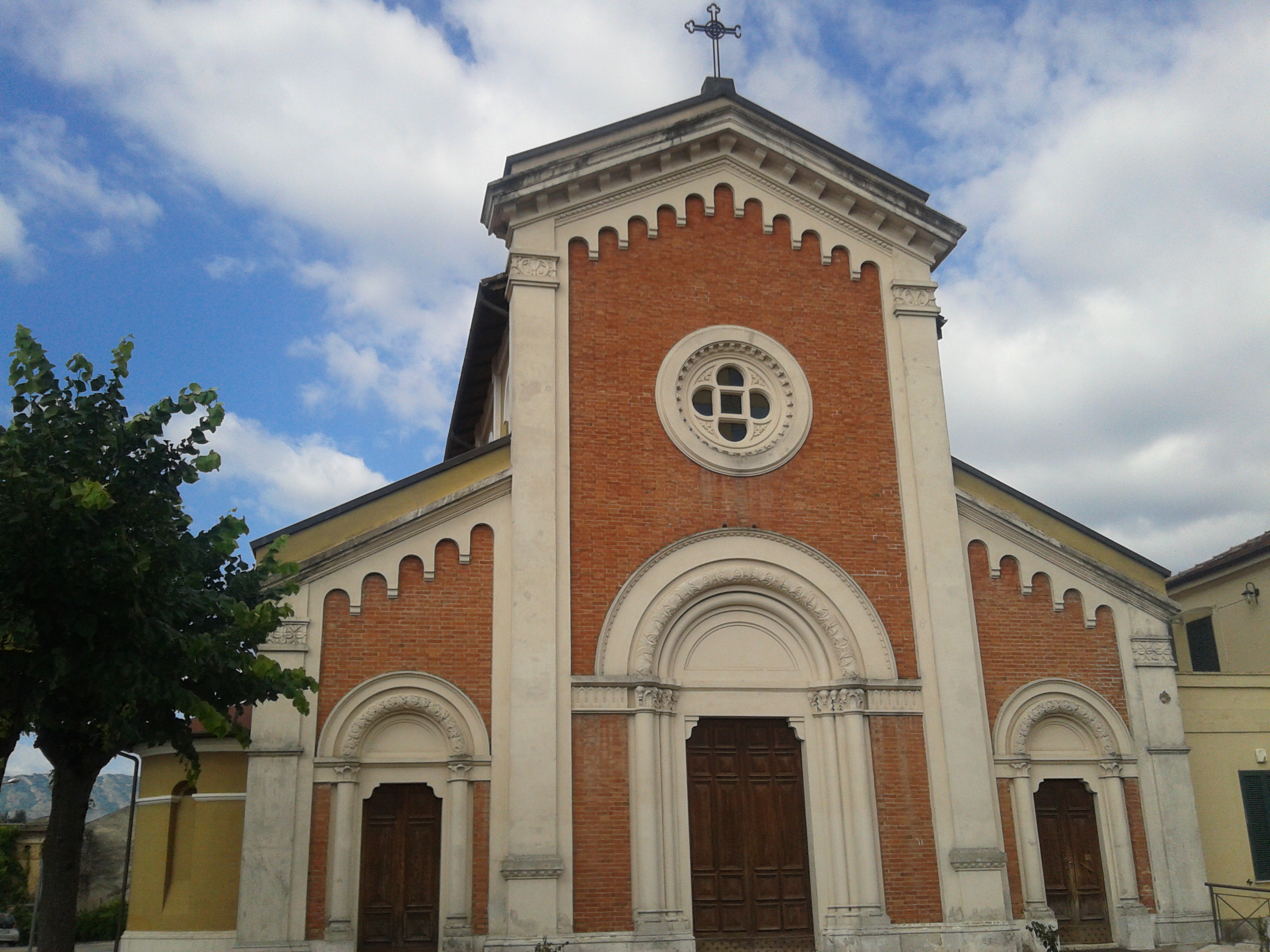 Chiesa di San Nicola